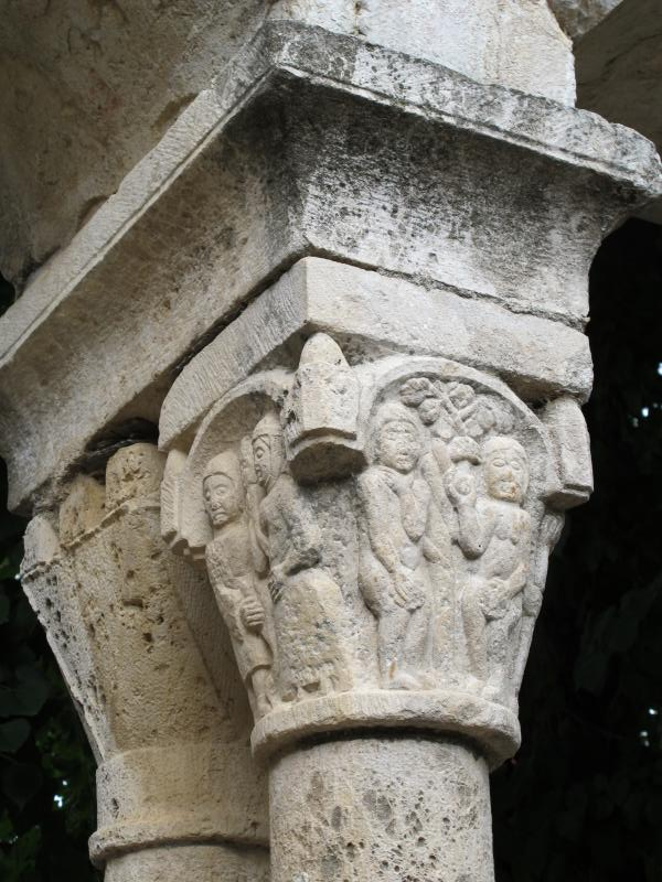 Detalle de un capitel del claustro de Sant Domenech (Perelada)